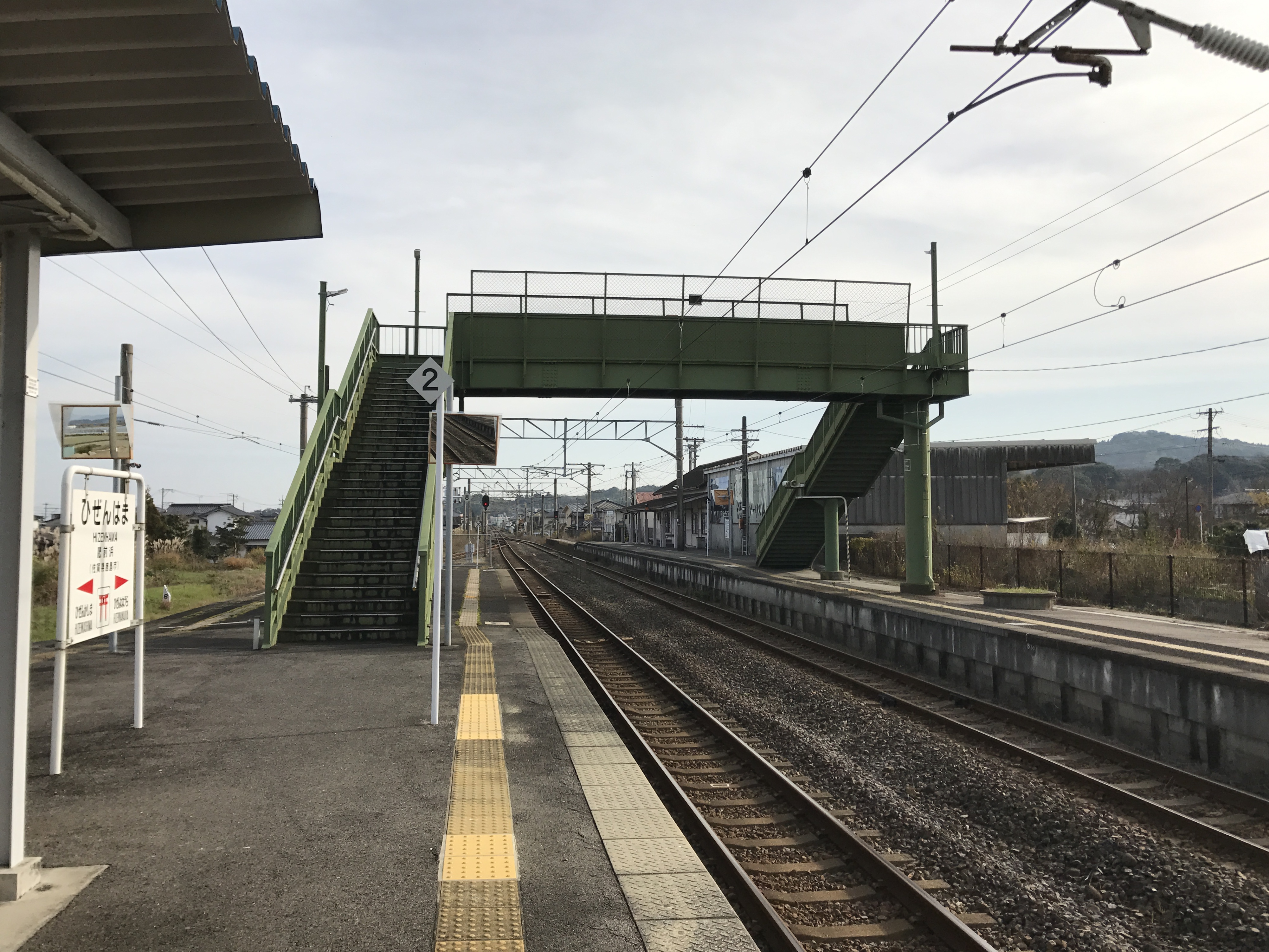 肥前浜駅のホーム(奥は肥前七浦方面)